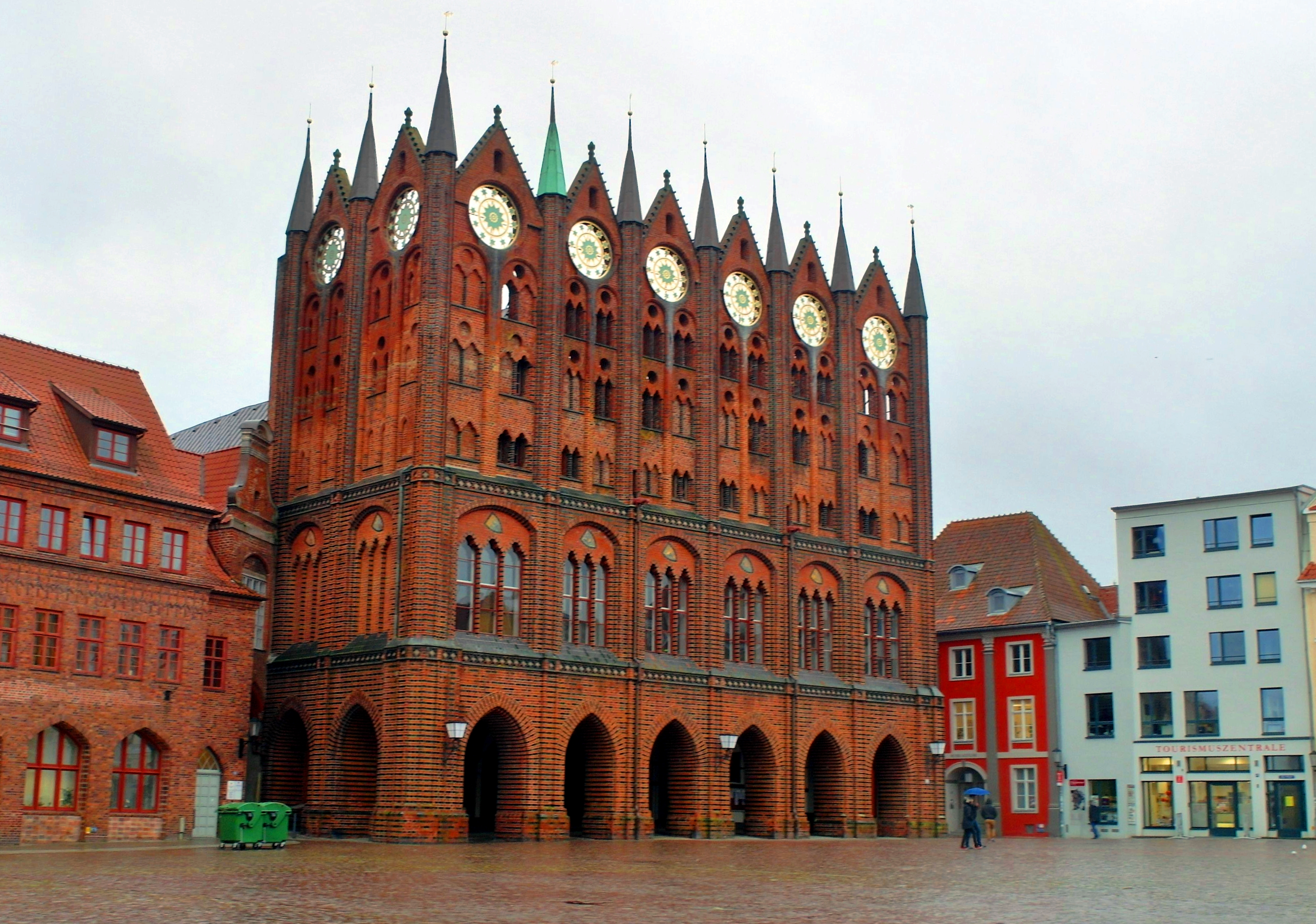 das Rathaus der Hansestadt Stralsund im Januar 2015